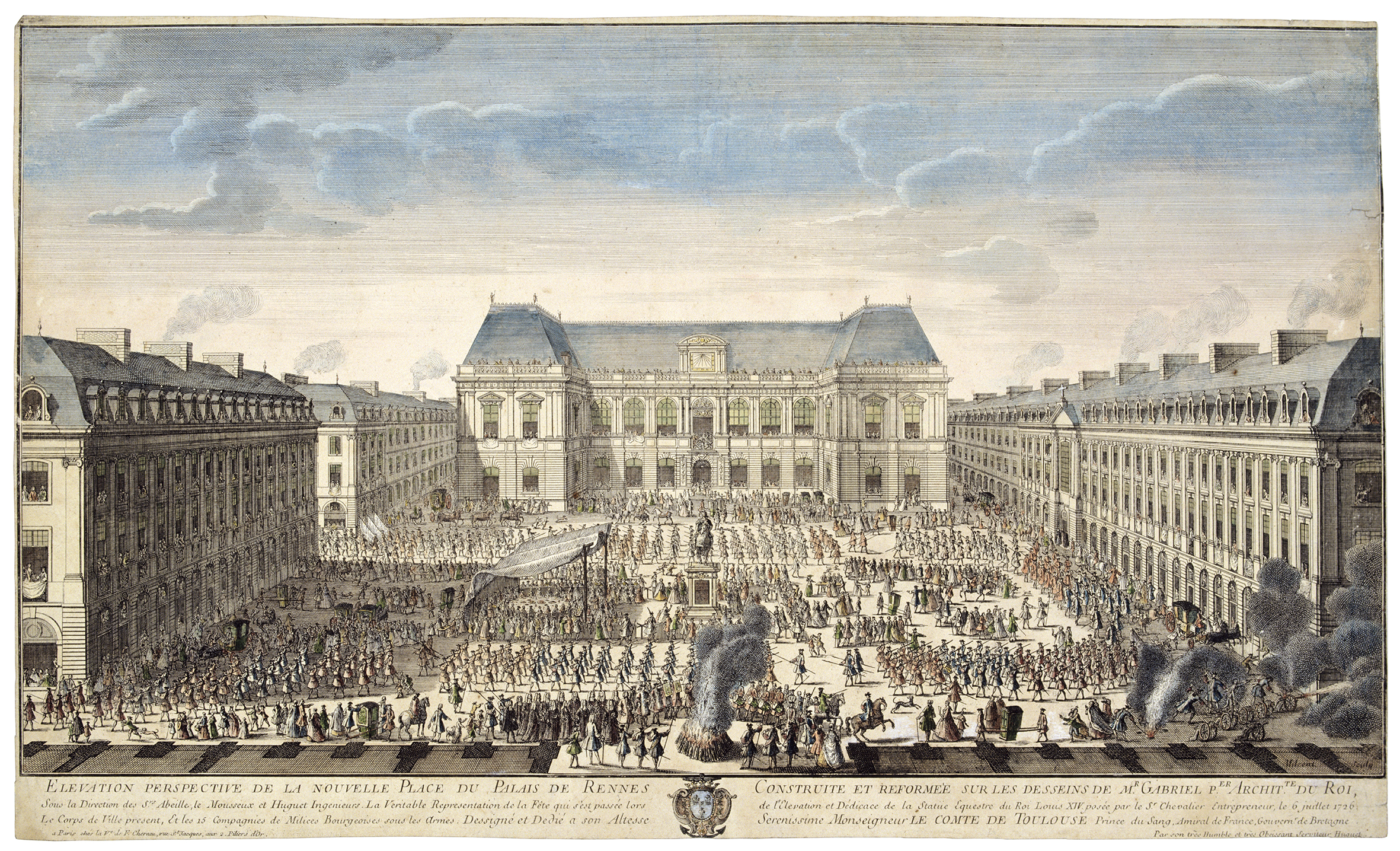 Gravure de Jean-François Huguet représentant la nouvelle place du Parlement de Rennes reconstruite par l'architecte Gabriel après l'incendie de 1720. Cette image évoque la cérémonie au cours de laquelle la statue équestre du roi Louis XIV a été inaugurée, au milieu de la foule présente sur la place et aux fenêtres du Palais.